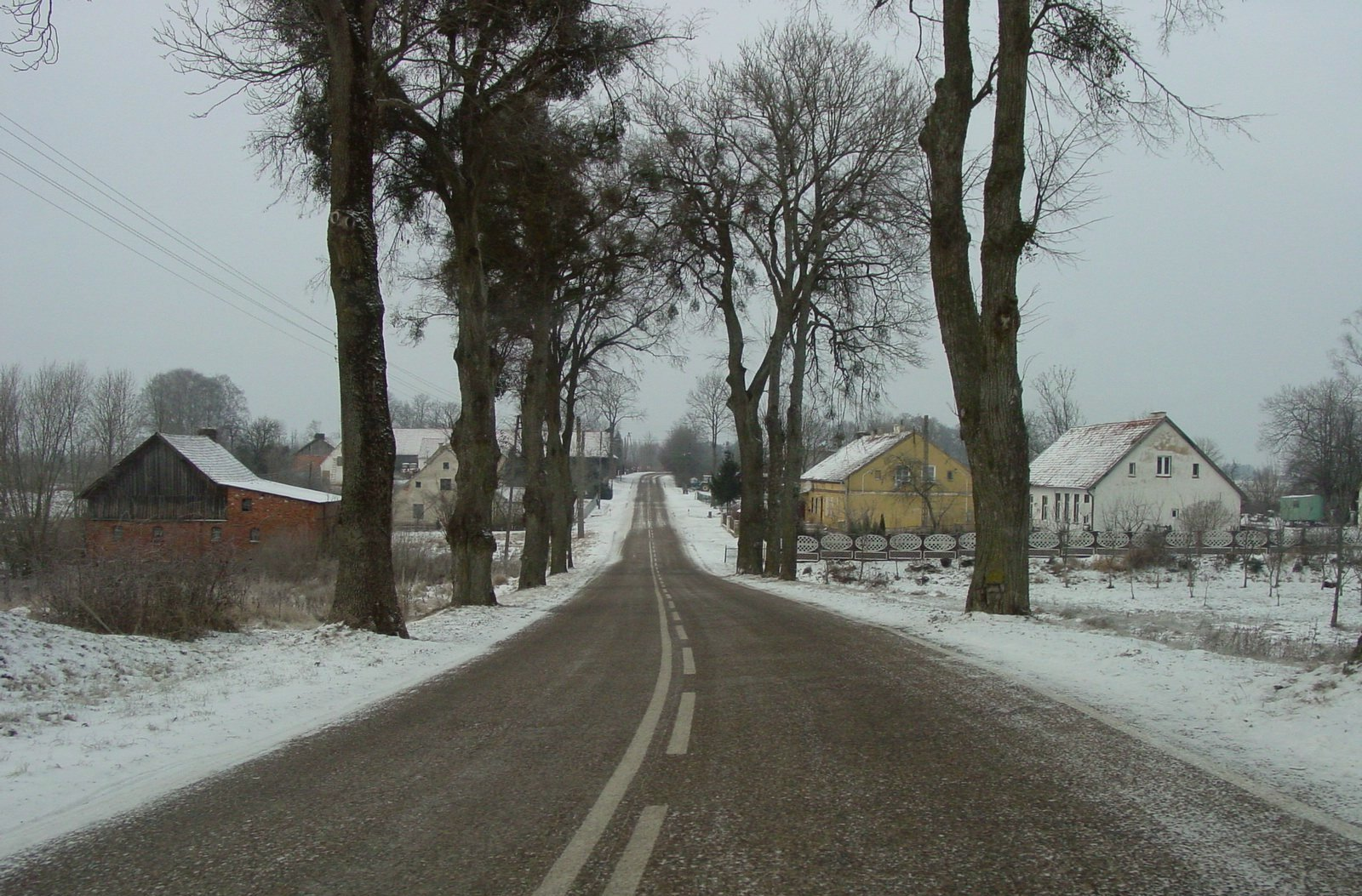 Perły - droga w stronę granicy.